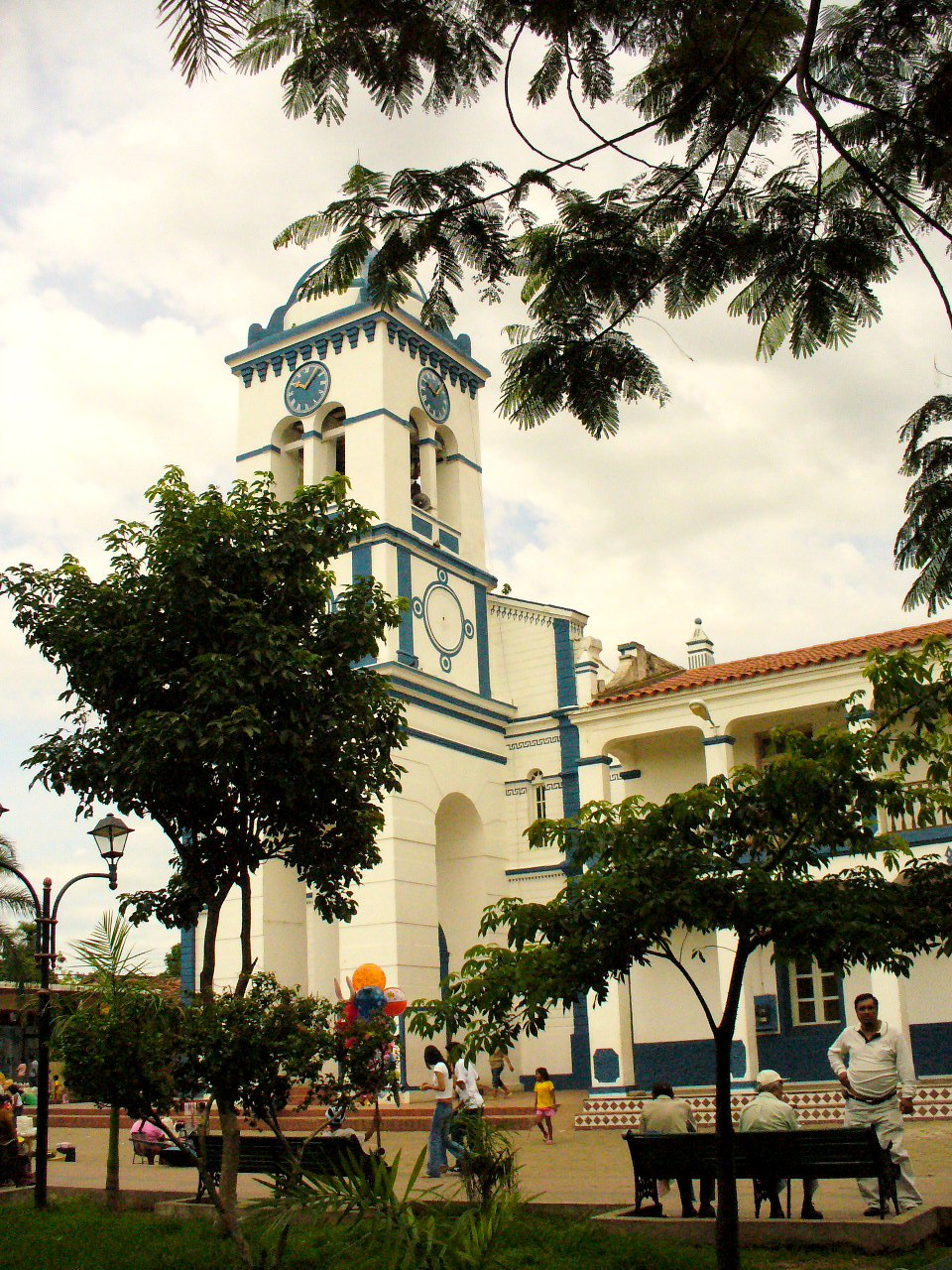 Es un pueblito cerca de Santa Cruz de la Sierra, muy religioso donde dicen se aparecio la virgen. Probe el sonso que es una masa de yuca con queso y la arepa boliviana (me quedo con la colombiana y especialmente con la paisa).